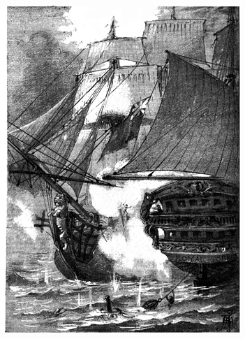 Ilustración de Trafalgar de Benito Pérez Galdós; edición ilustrada por Enrique y Arturo Mélida. Madrid, Administración de La Guirnalda y Episodios Nacionales, 1882.